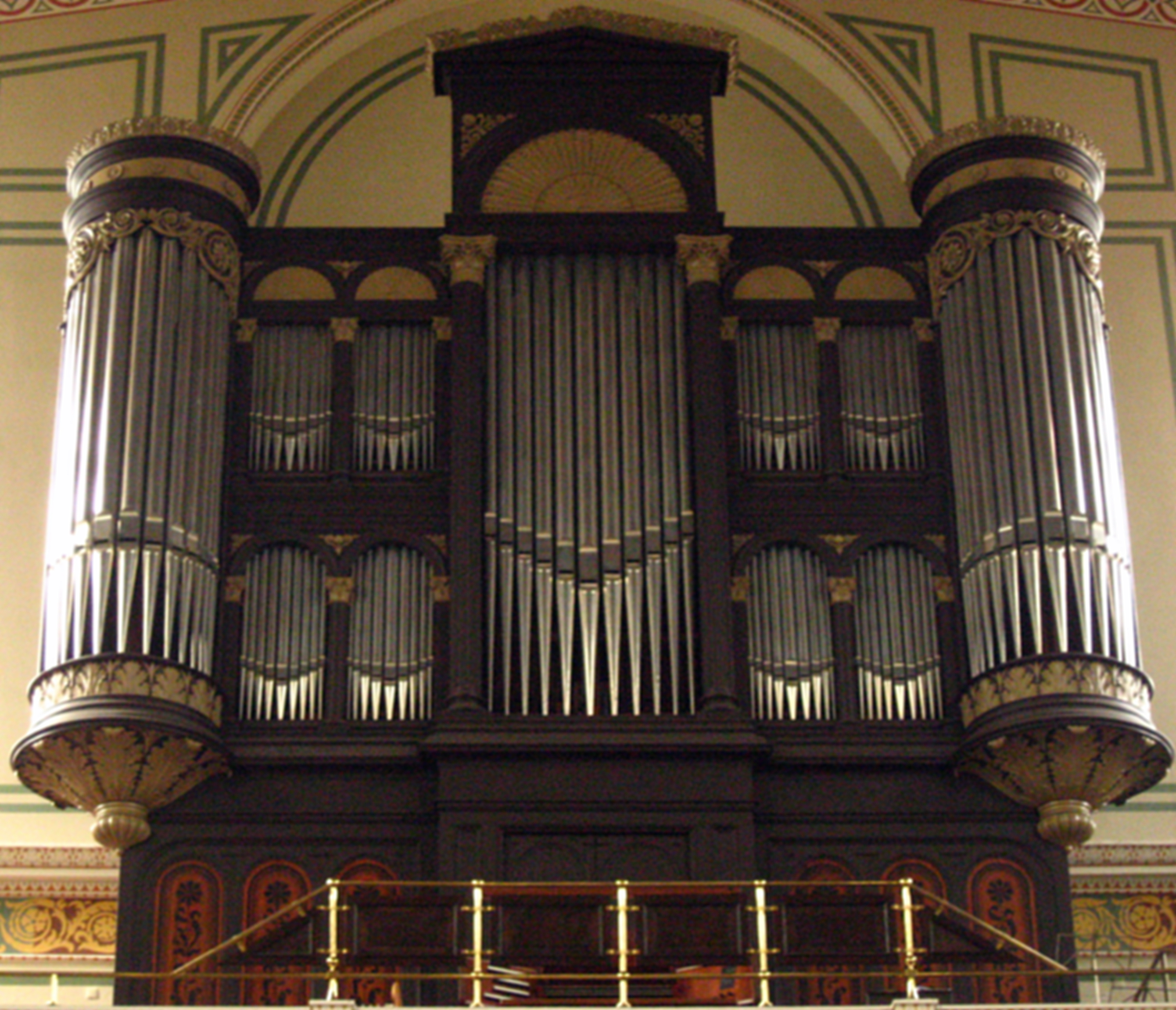 Potsdam - St. Peter und Paul - Orgel (Schuke Potsdam 1936)